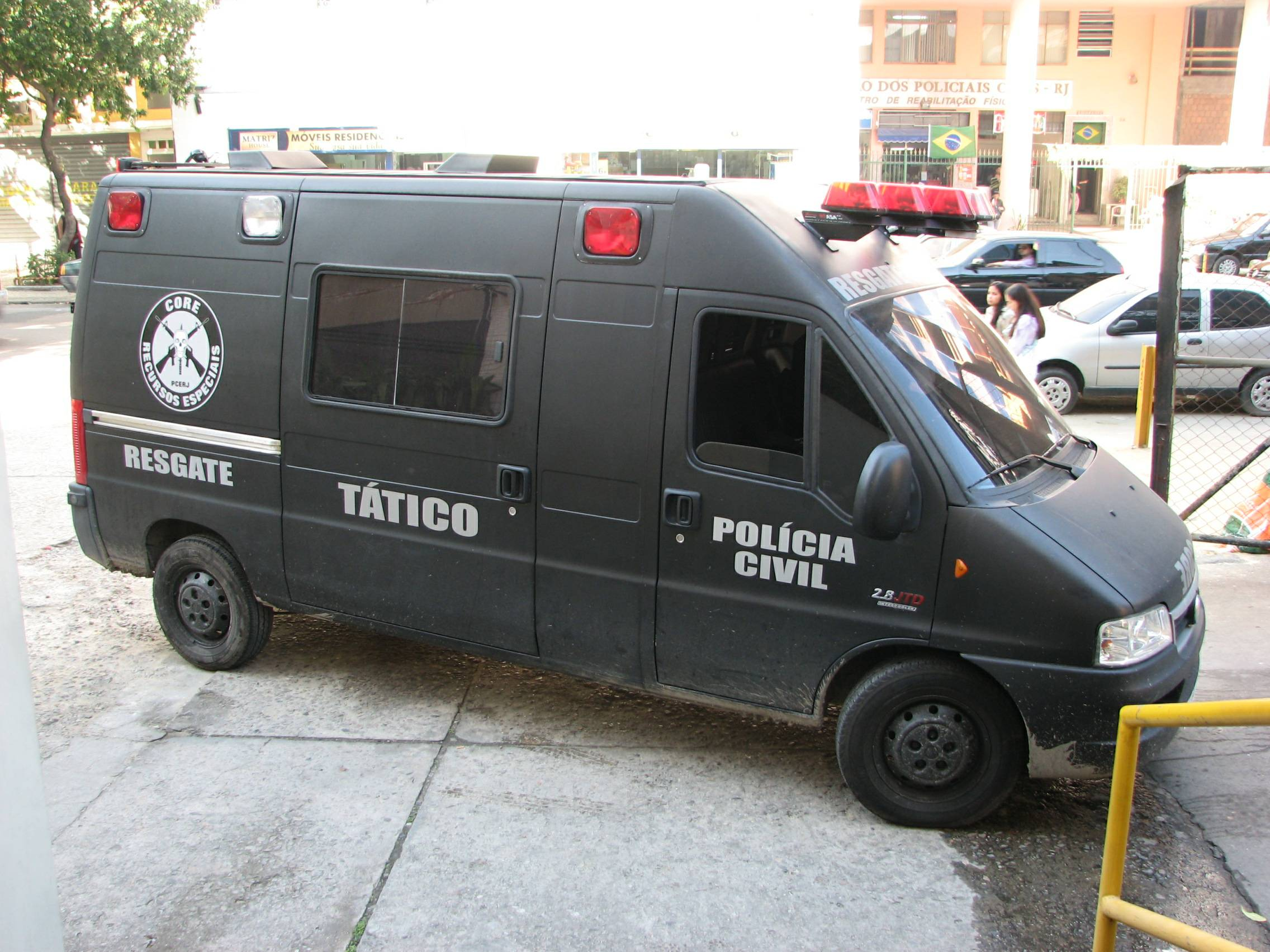 CORE - Rio de Janeiro SWAT team